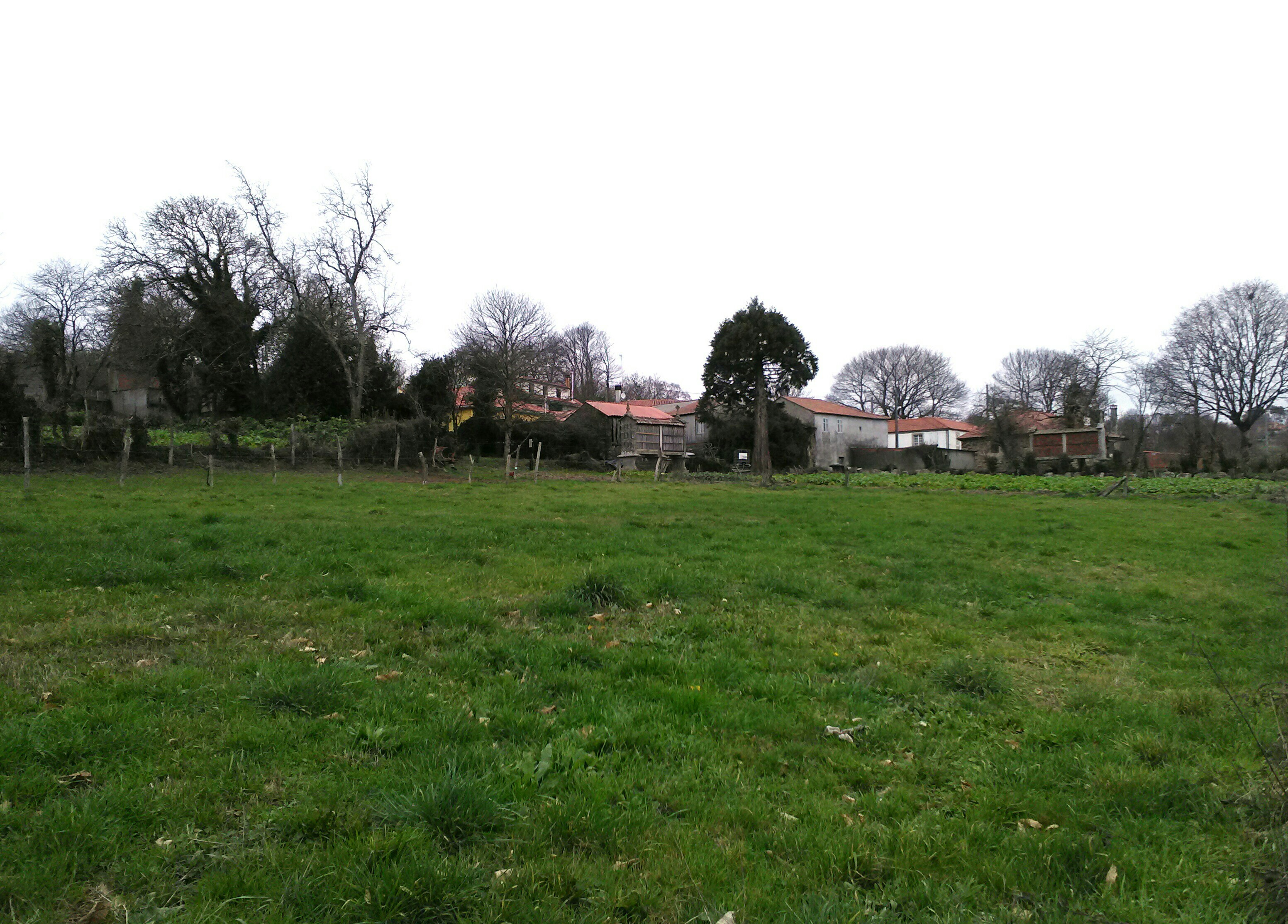 Vista parcial da aldea de Ateán (Botos)